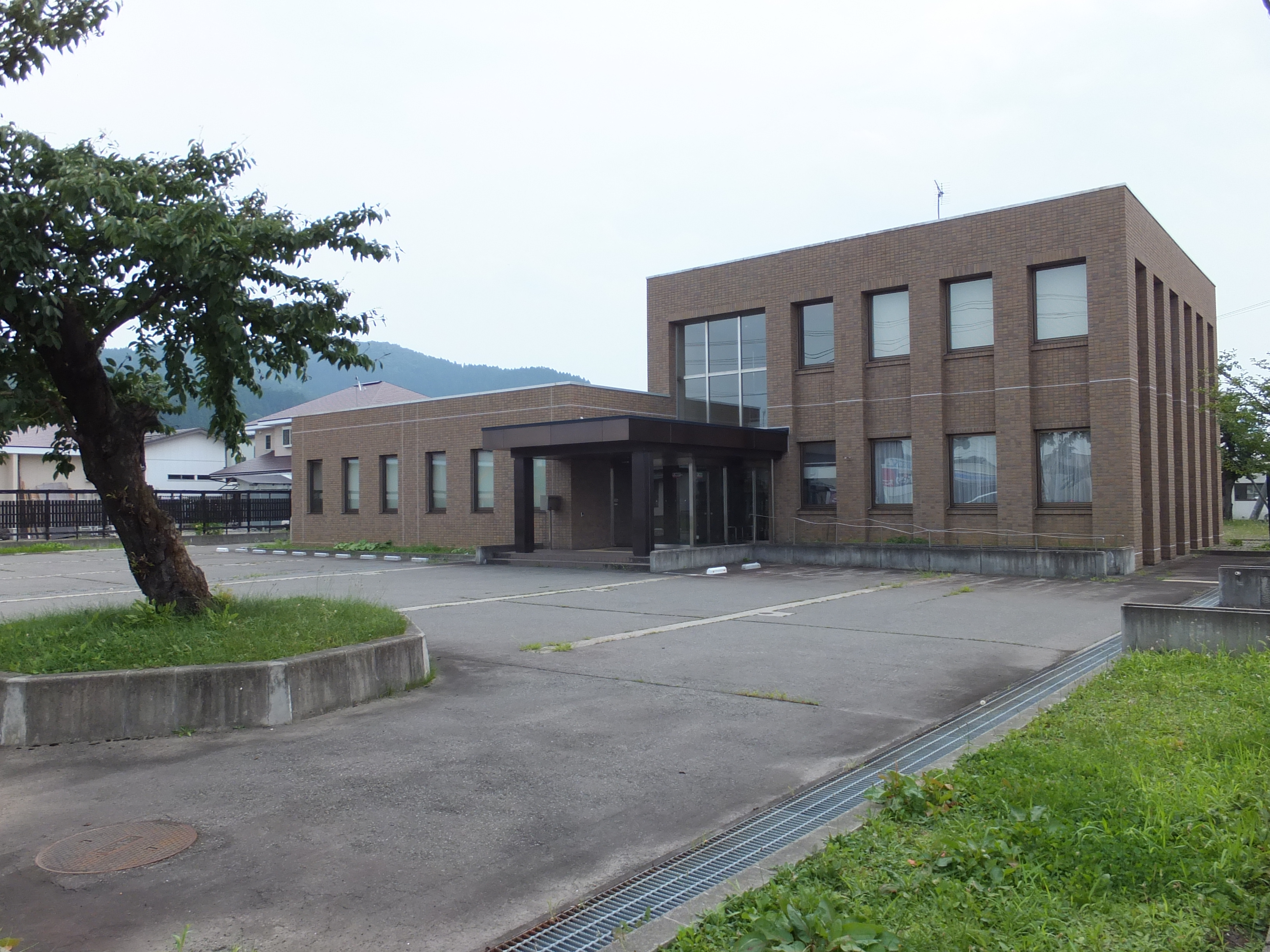 湯沢簡易裁判所